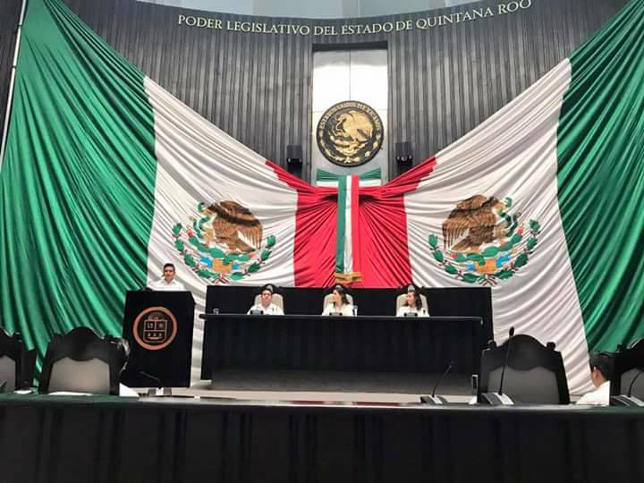 Mesa Directiva en Sesión del Pleno